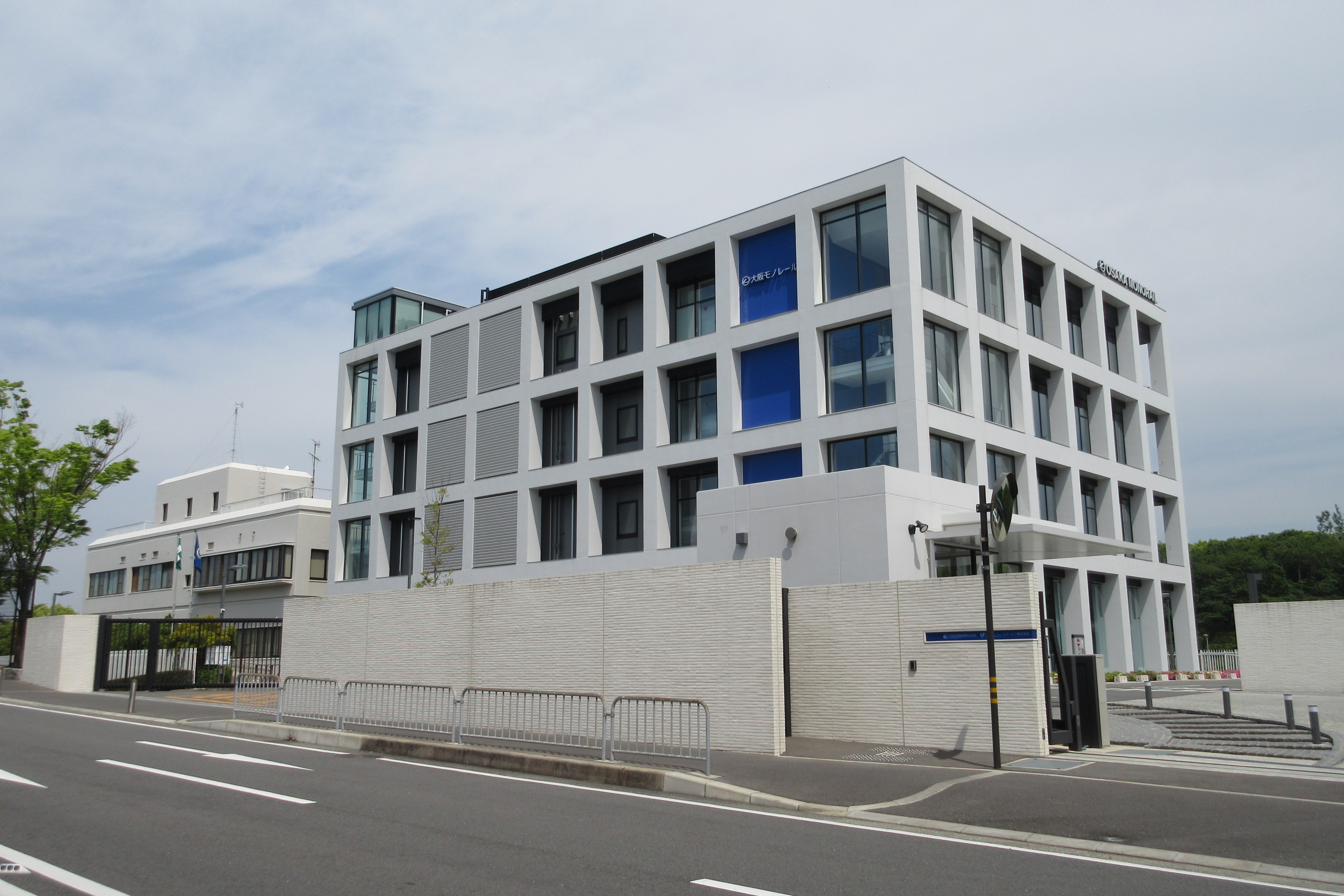 大阪高速鉄道本社